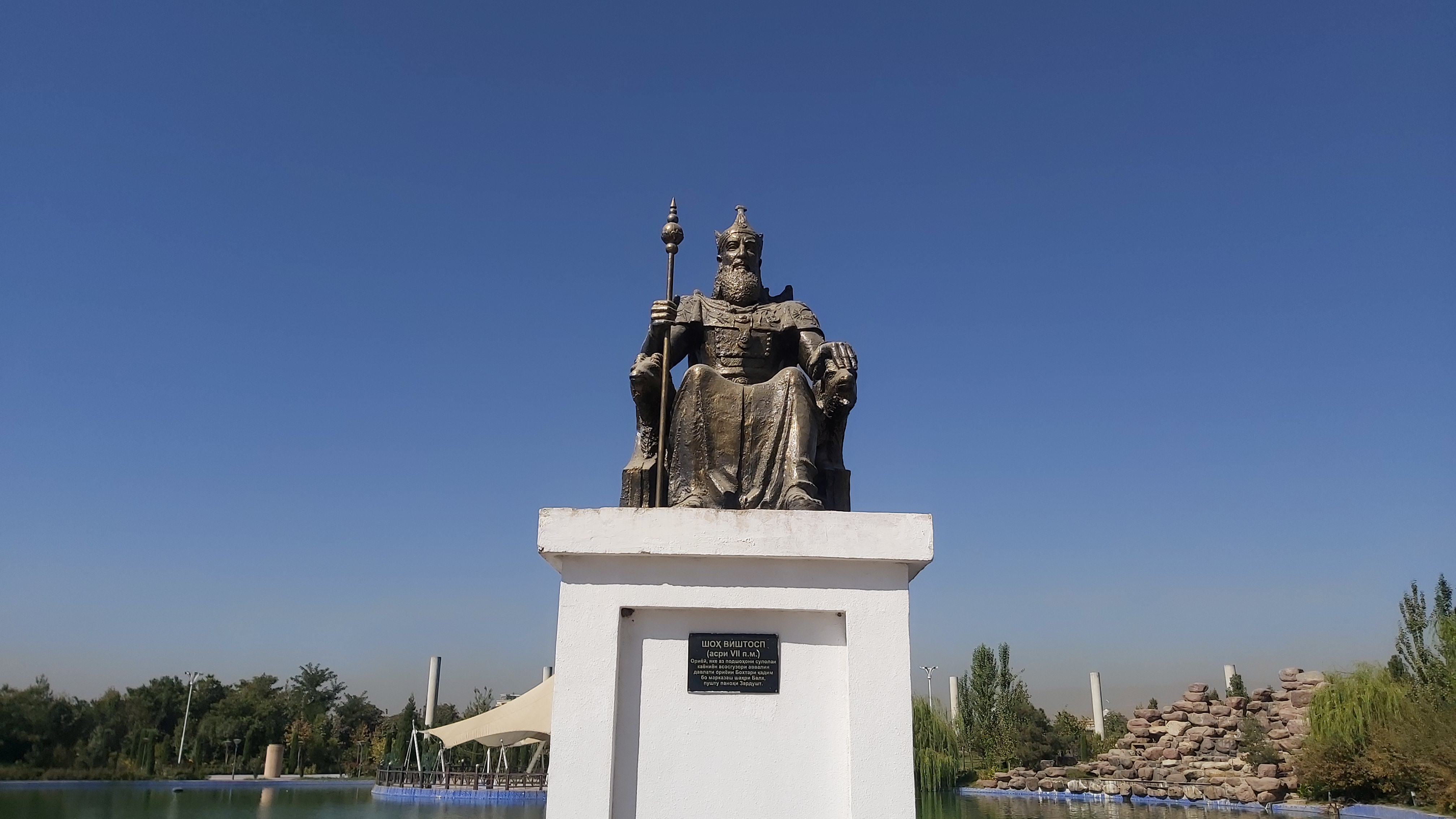 Виштопс